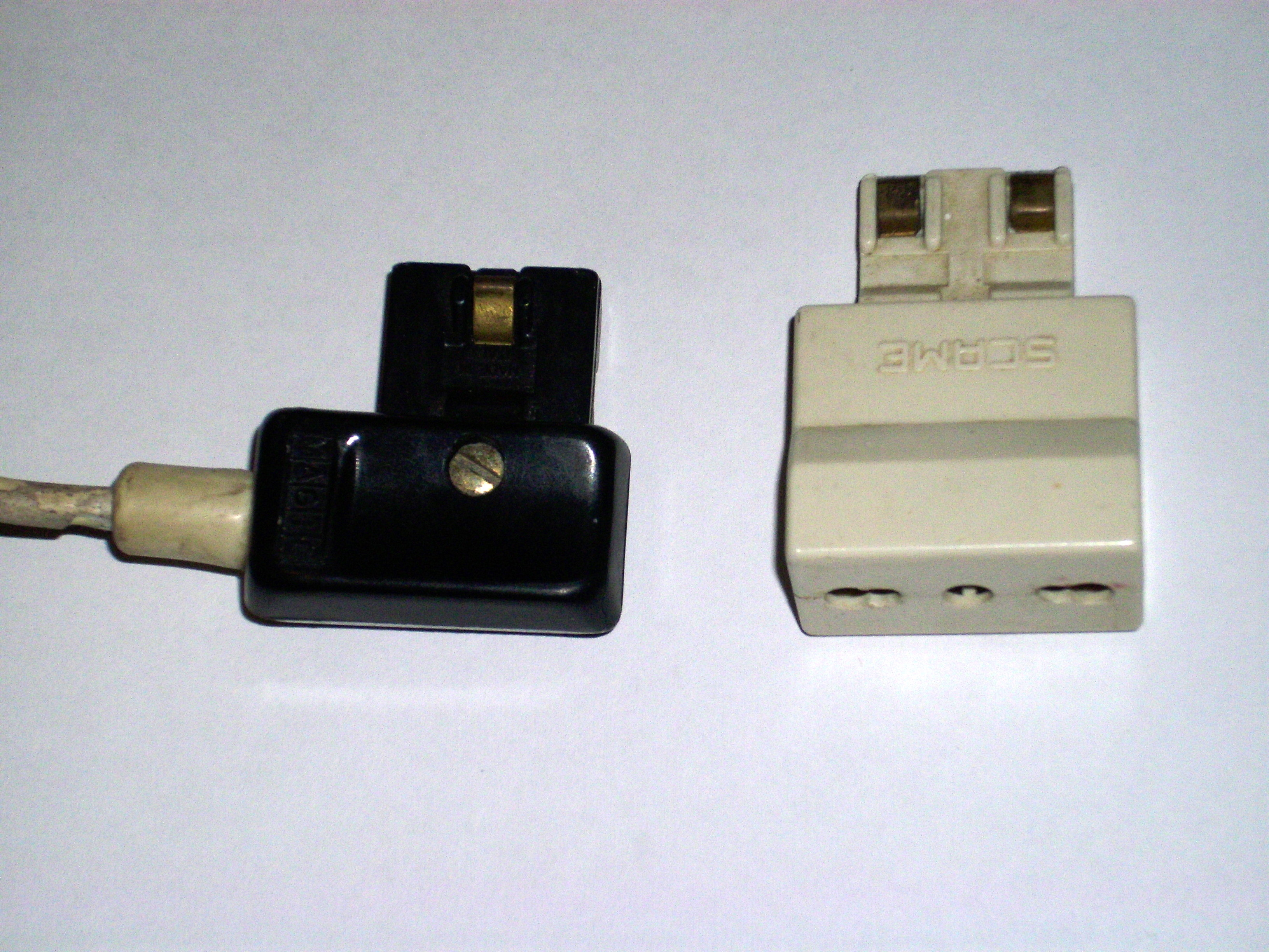 Spina di tipo "Magic" (spina volante irreversibile) della BTicino da 10 A (2 fasi più terra), e adattatore con presa per spina tipo L CEI 23-16/VII. Diffusa in Italia negli anni '70 e '80.